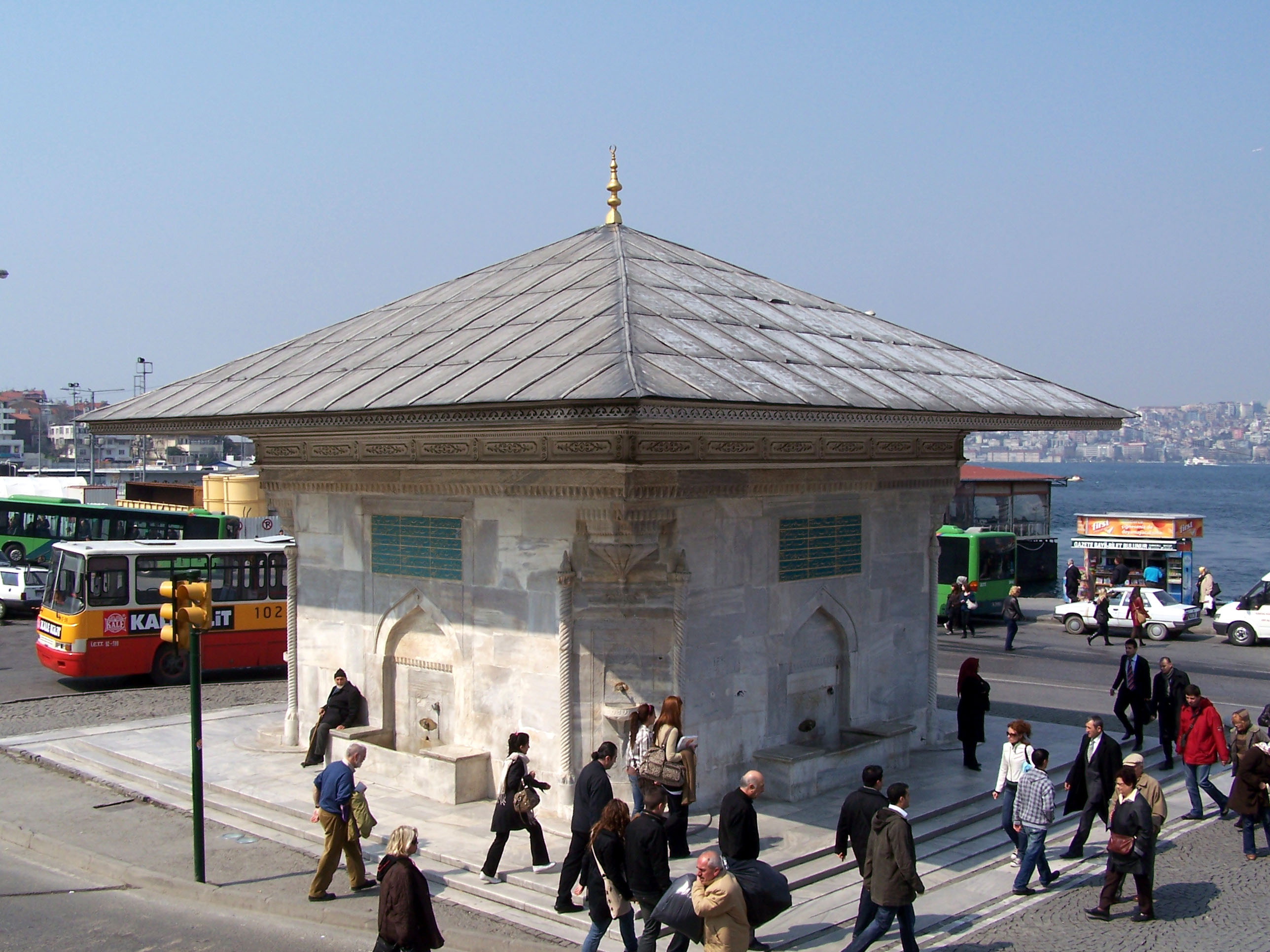 Çeşme near Mihrimah Sultan Camii in Üsküdar, İstanbul, Turkey